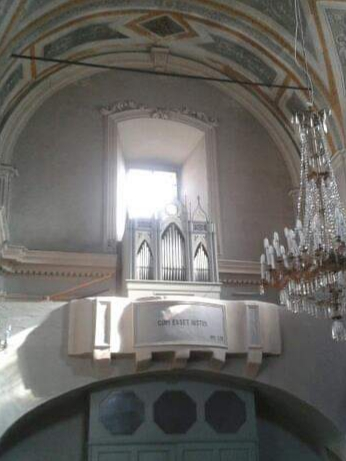 Interno della Chiesa San Giuseppe, Leonforte - Organo a canne realizzato da Sebastiano Calcerano Platania nel 1866.